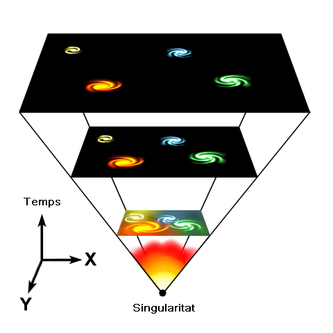 Big Bang